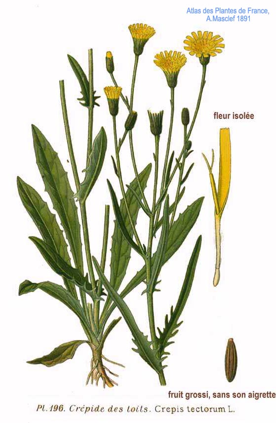 Crepis tectorum L.